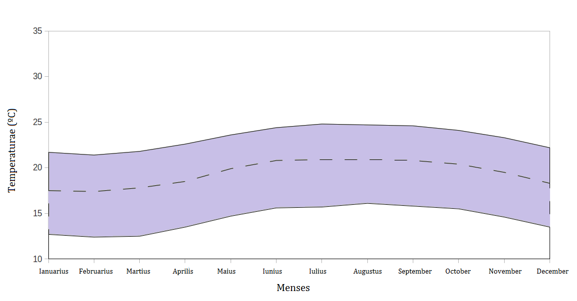 Minimarum temperaturarum campus et media ratio (secta linea) in Portorico.